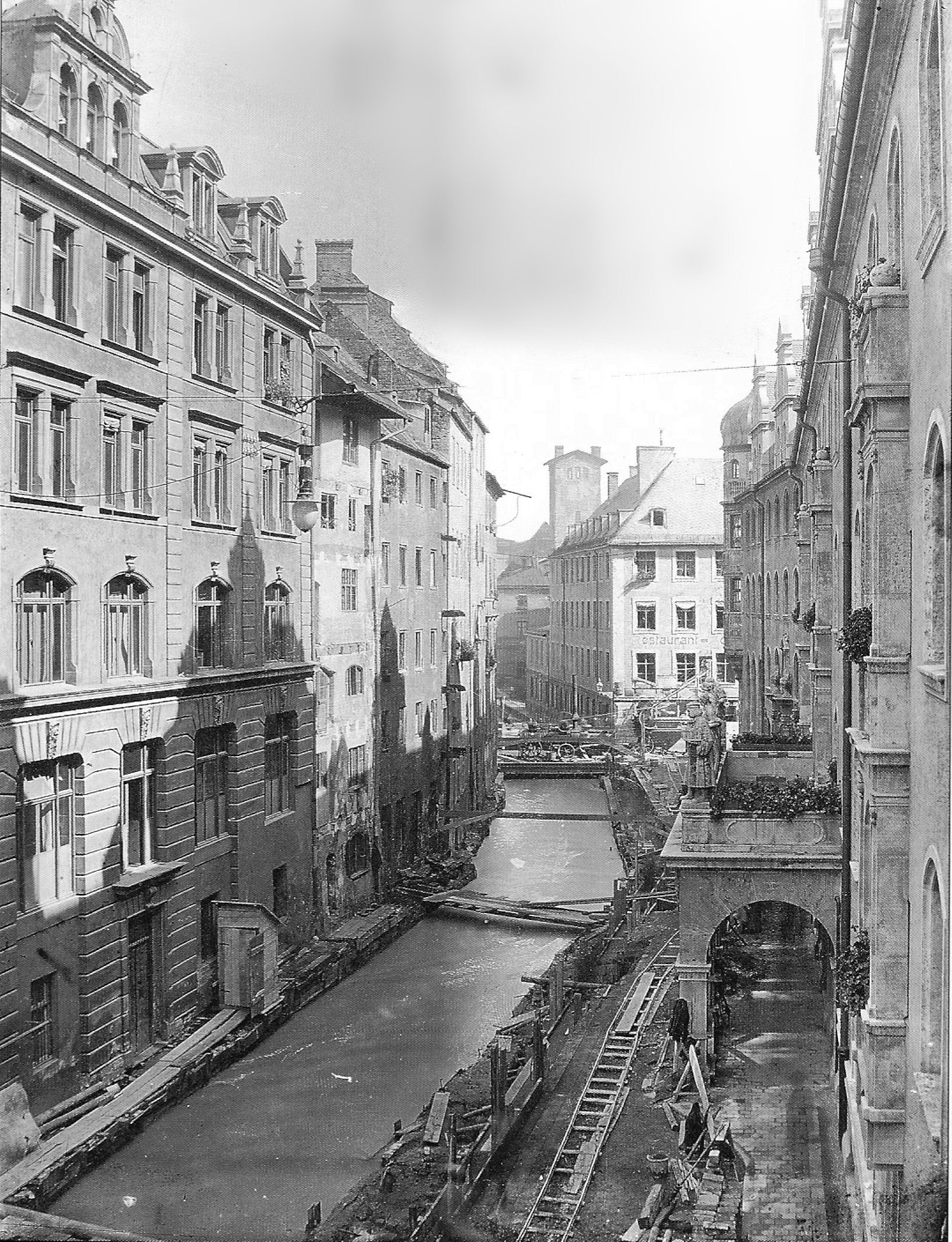 Pfisterbach nördl. (heute Sparkassenstr.), vom Tal gesehen. Der Pfisterbach verläuft inzwischen unterirdisch, mit der Überwölbung entstand gleichzeitig die neue Straße. Im Hintergrund ist das Maximiliansbrunnhaus mit einem Turm zu sehen (inzwischen abgerissen), davor befindet sich das Scholastikahaus (1 Block). Rechts im Bild ist der fast vollendete Grässel'sche Verwaltungs- und Sparkassenbau zu sehen..